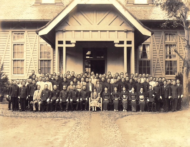 中文（台灣）: 建於大正3年 (1914)